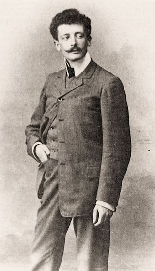 Portrait de Victor Segalen, Tiffauges (?), 1905. Photographie prise au moment de son mariage avec Yvonne Hebert.